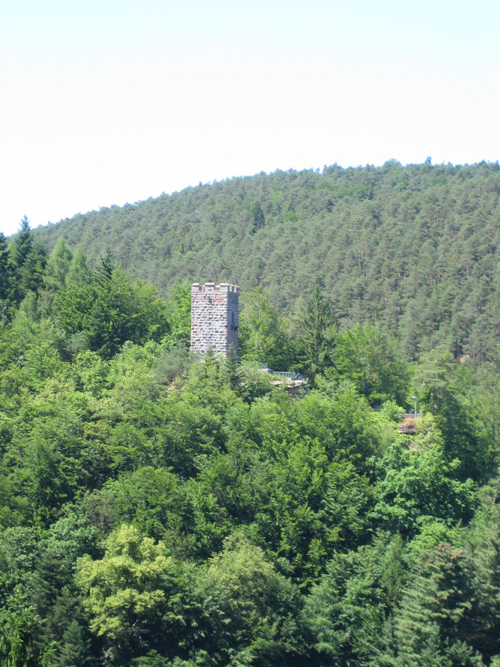 Burgruine Erfenstein